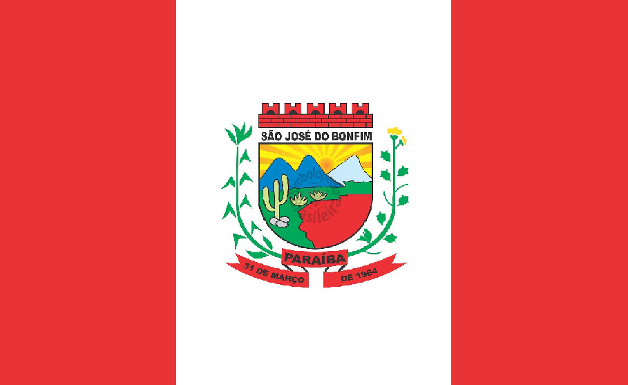 Bandeira do município de São José do Bonfim na Paraíba